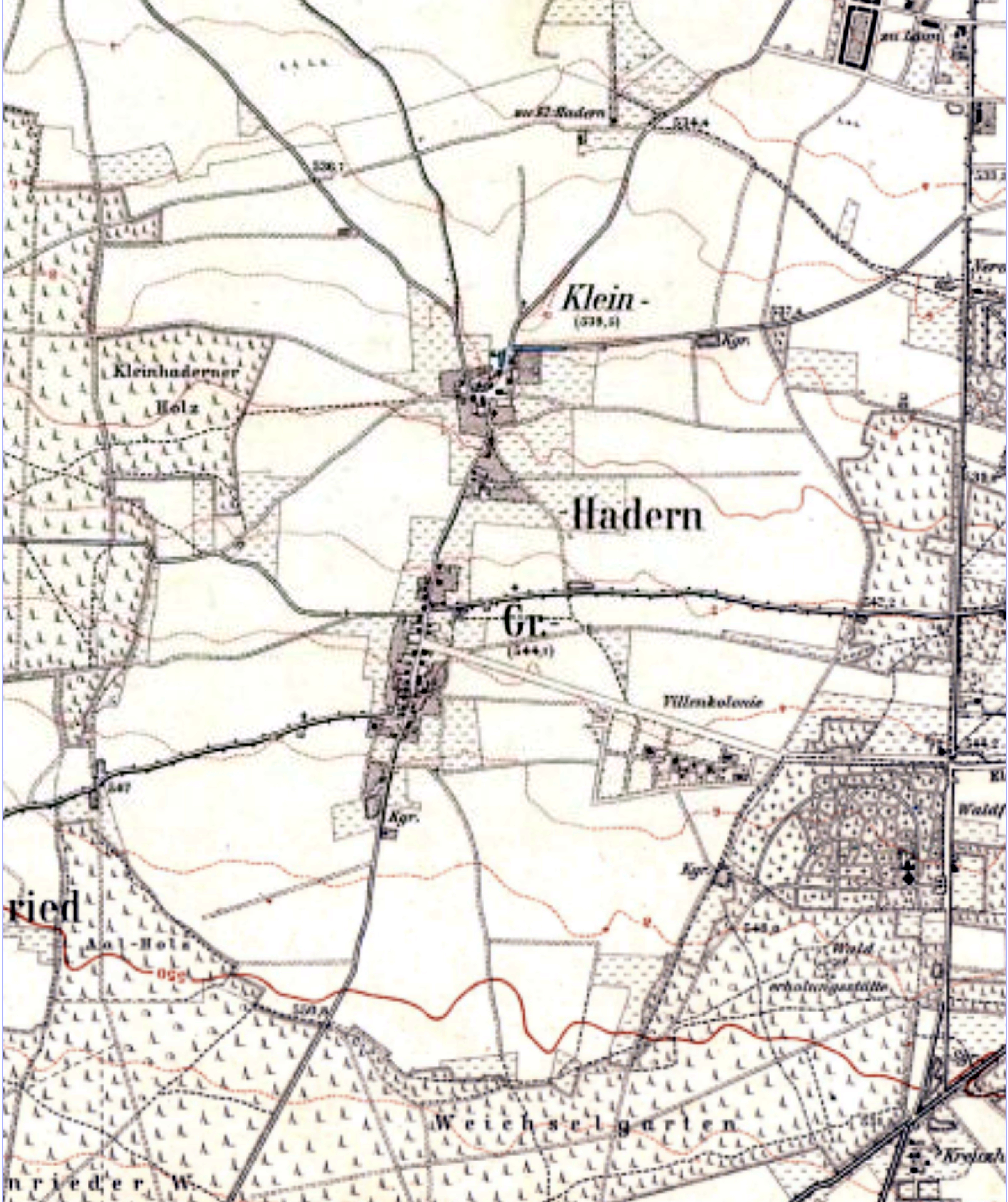 Das Gebiet der ehemals selbständigen Gemeinde Hadern auf Topographischer Karte von 1915.